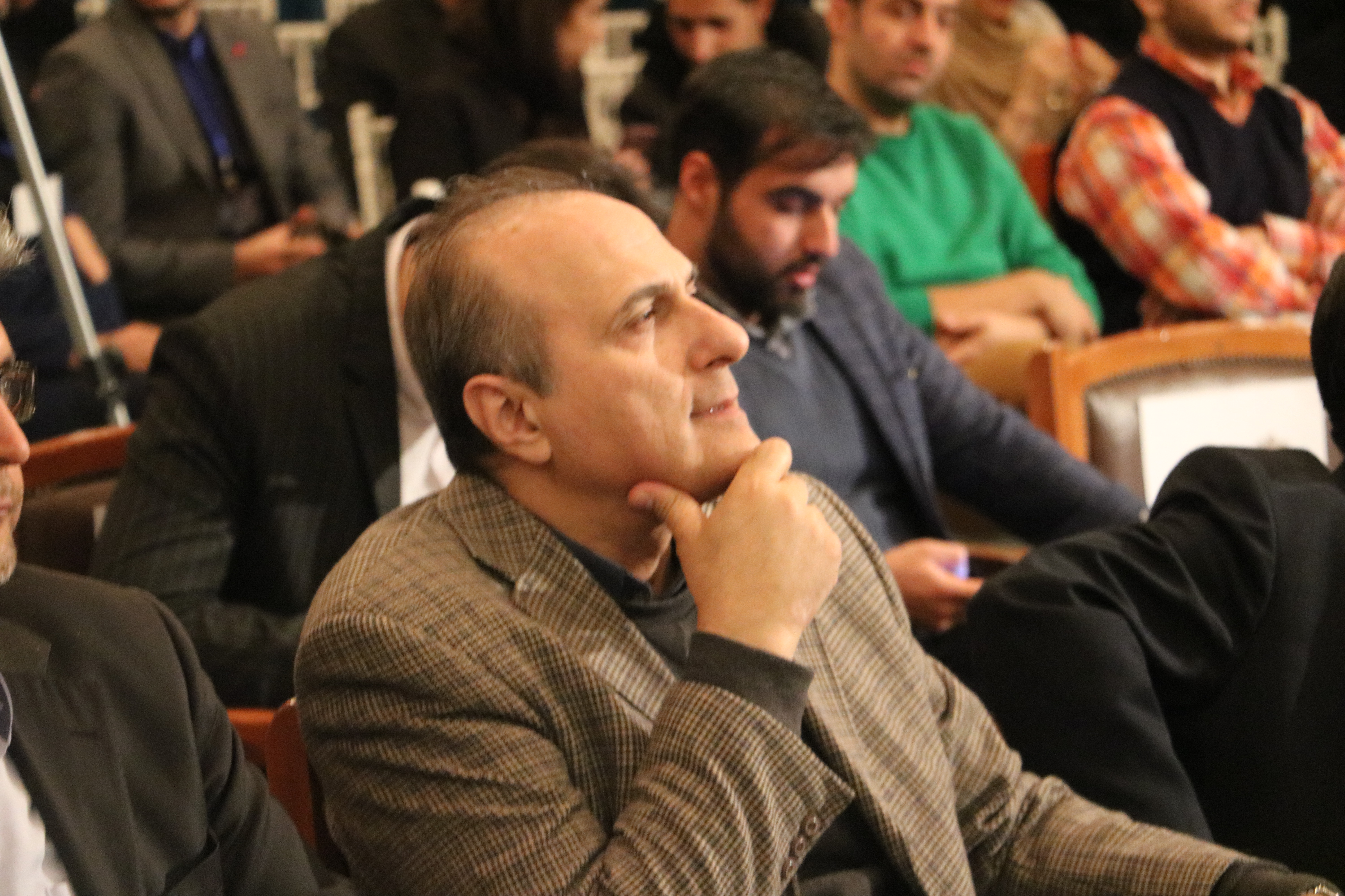 در جشن بیست سالگی کانون های فرهنگی دانشگاه تهران